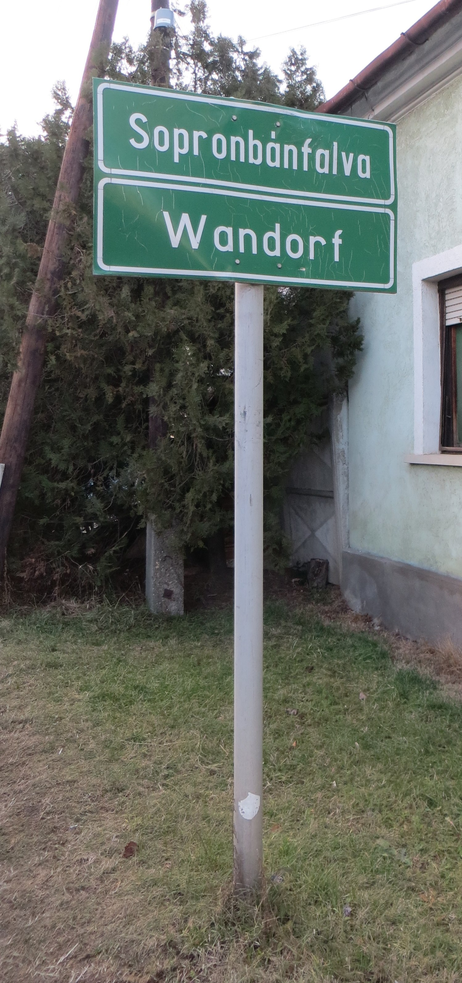 zweisprachige Ortstafel Warndorf